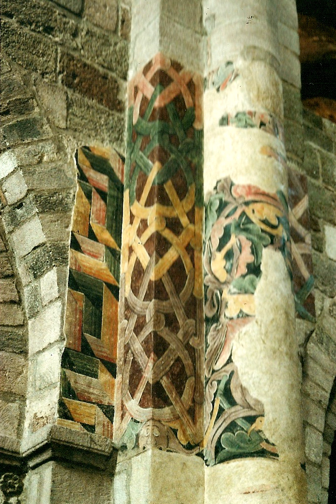 St.-Julien Broude, Fresko, Nathexpfeiler